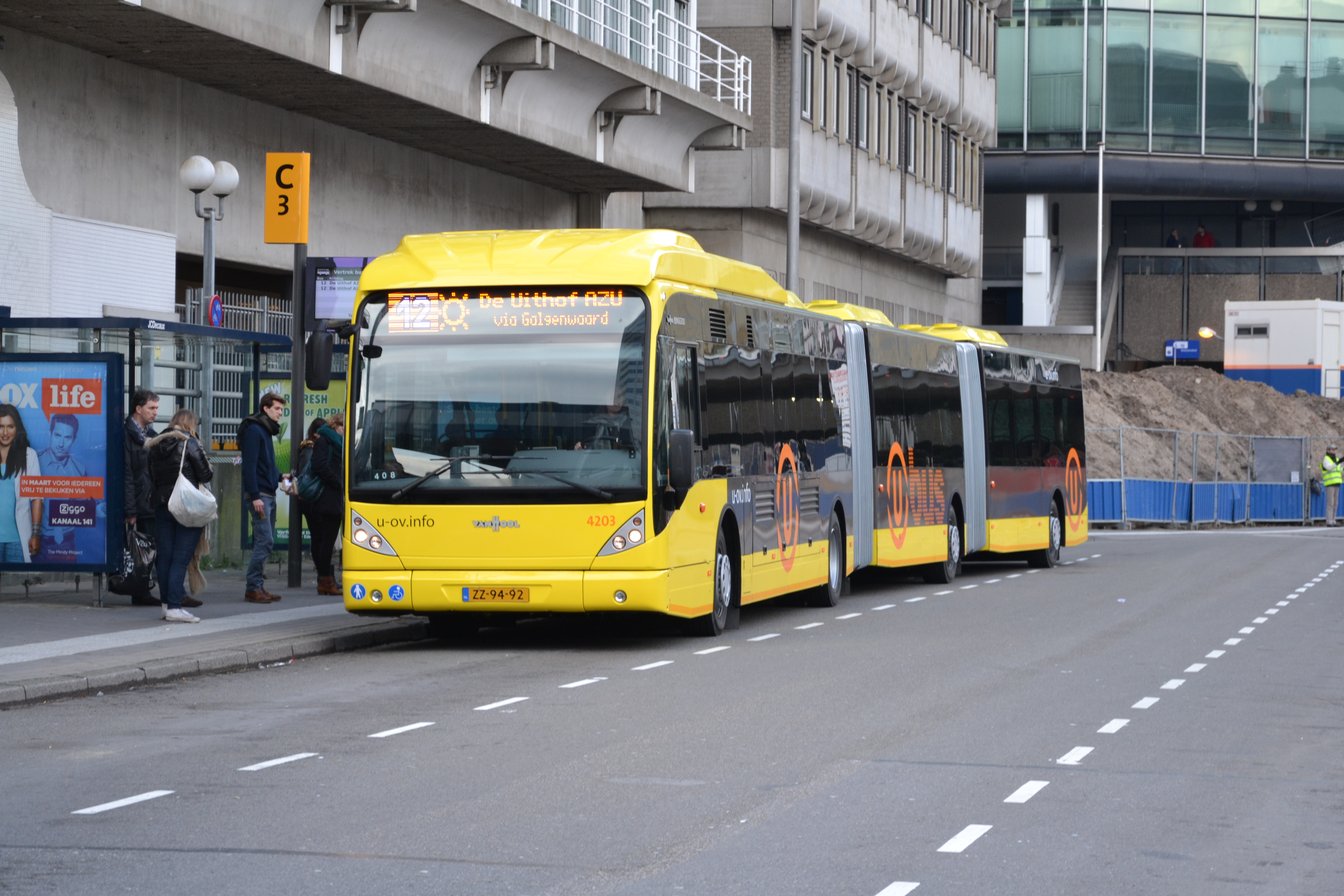 Sinds vandaag rijdt de eerste nieuwe Van Hool-dubbelgelede op de Utrechtse lijn 12. Een schel contrast met de blauwe ex-GVU-bussen vormen ze, qua kleur, maar ook qua comfort. Vanmiddag spotte ik de 4203, de enige actieve gele dubbegelede op dit moment, op busstation Centrumzijde.